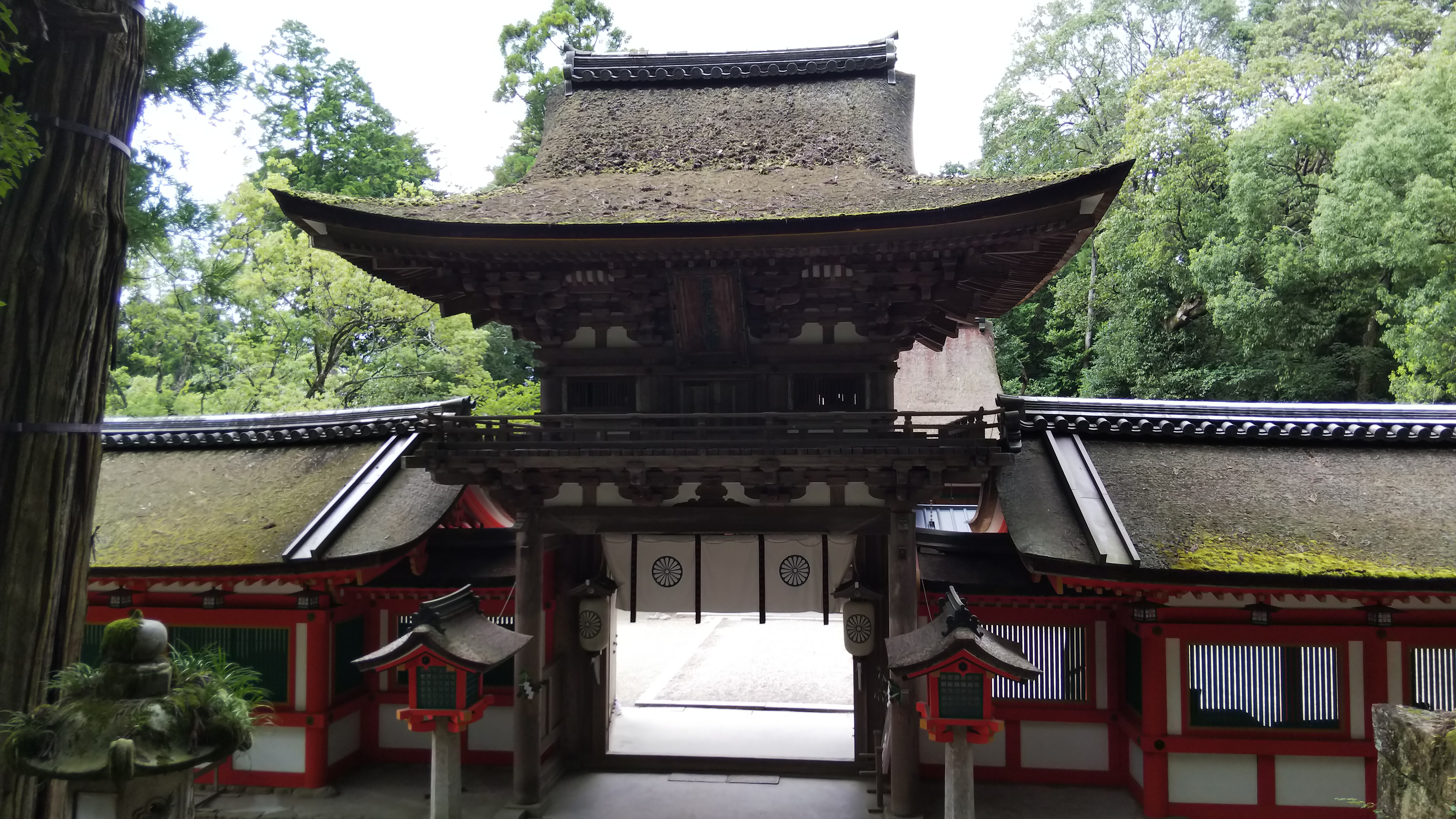 石上神宮楼門